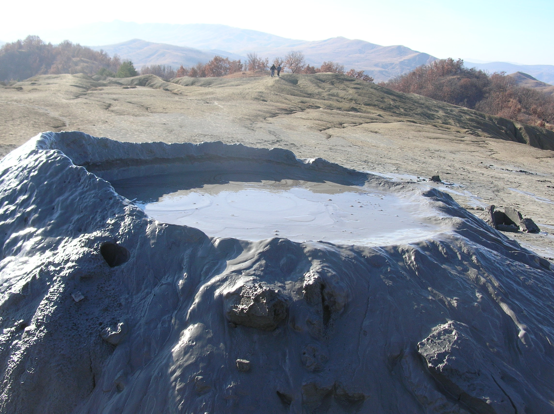 Vue d'un cratère typique sur le site des volcans de boue près de Berca, dans le Parc Naturel 'Vulcanii noroioşi'.